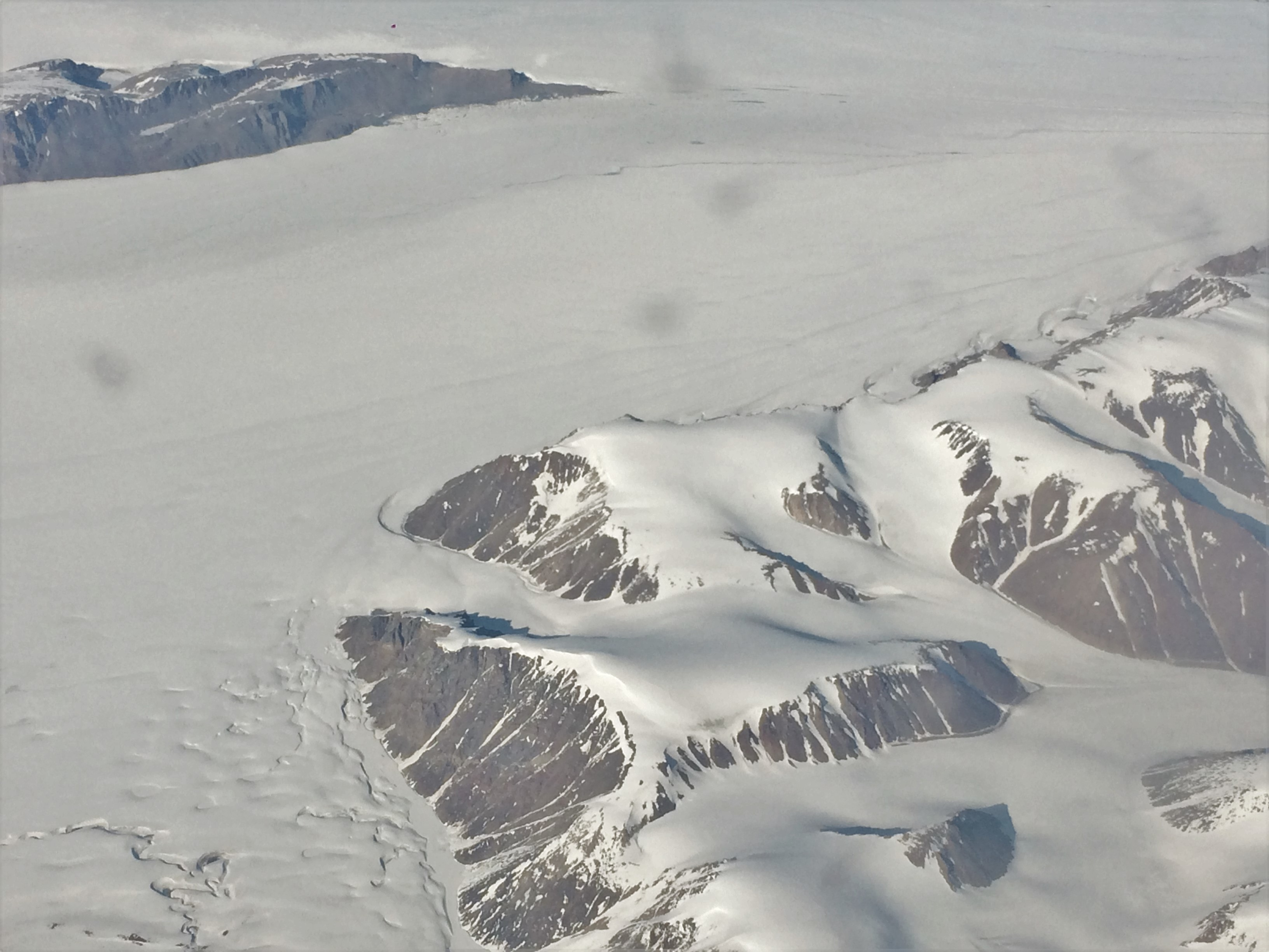 Ghiacciaio Adolf Hoels Gletscher